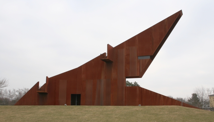 Lëtzebuerger Tuerm zu Tréier (Mäerz 2006)